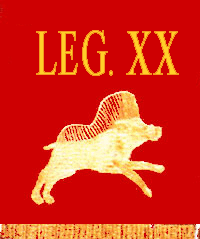 Legio-xx-vexillum